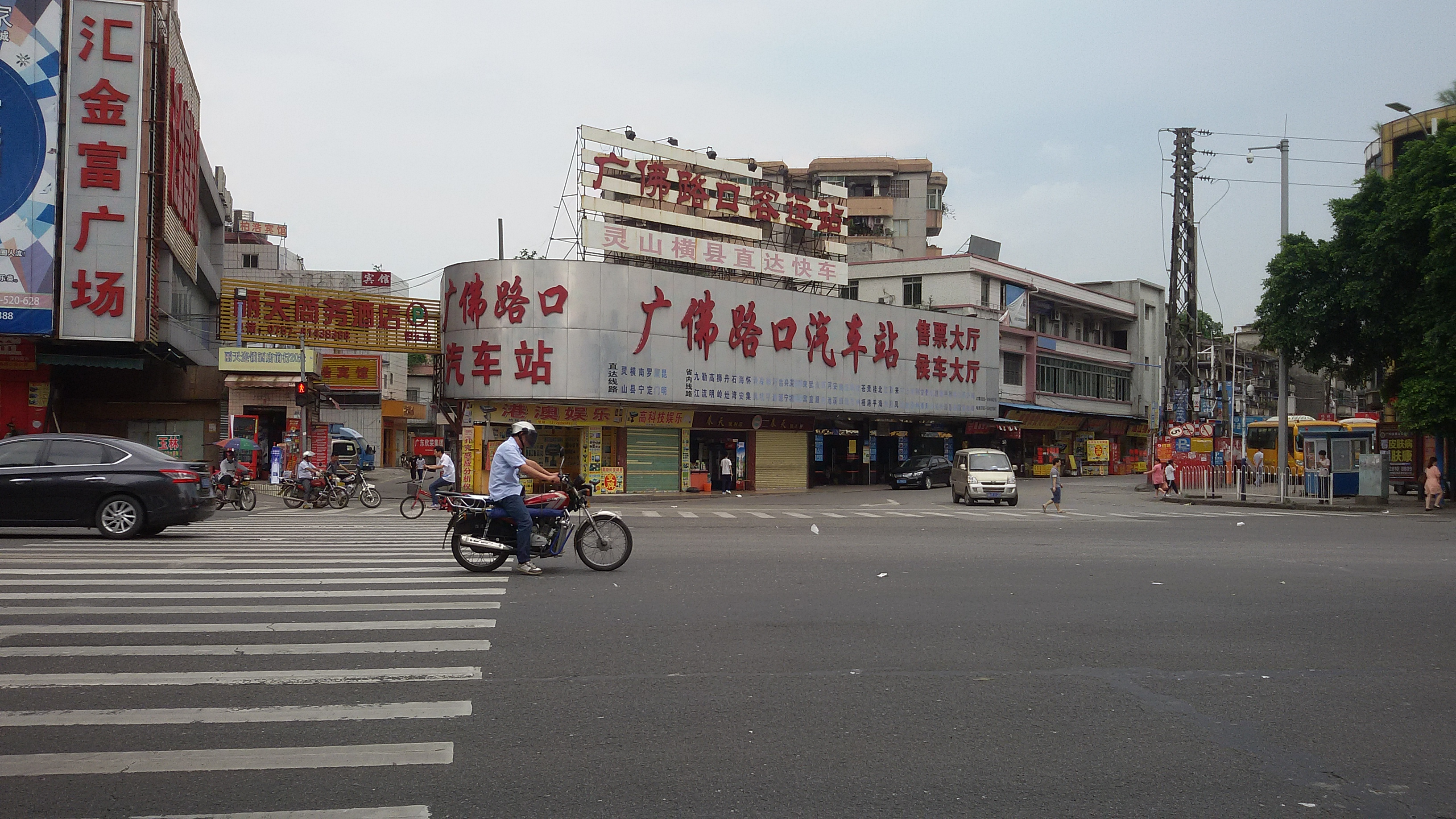 粵語: 廣佛路口汽車客運站